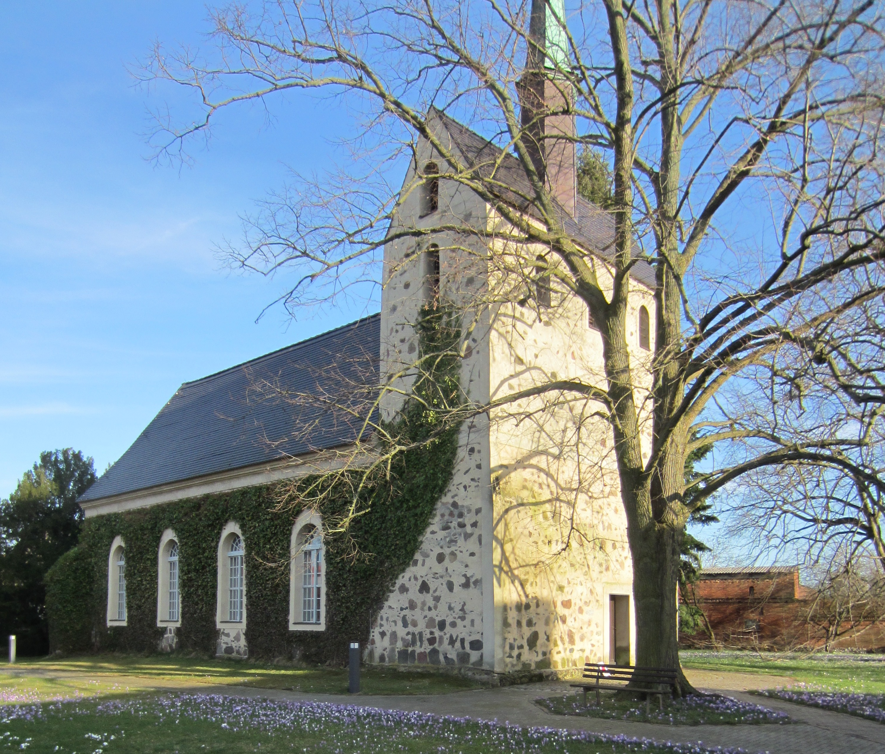 Langengrassau, Gemeinde Heideblick, denkmalgeschützte Dorfkirche, Ansicht von Nordwesten